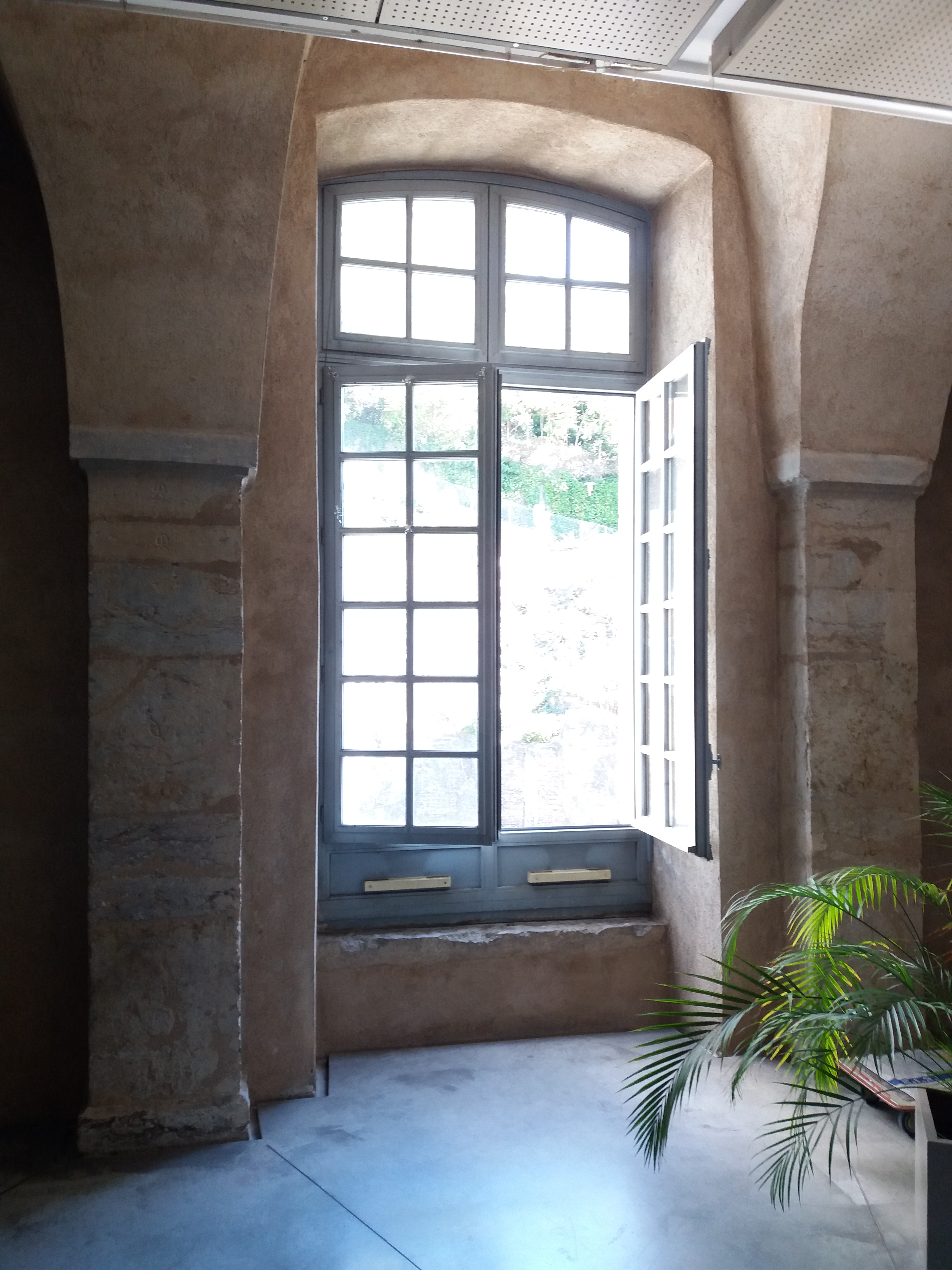 Lyon, grenier d'abondance. Fenêtre ouvrant sur l'arrière du bâtiment.